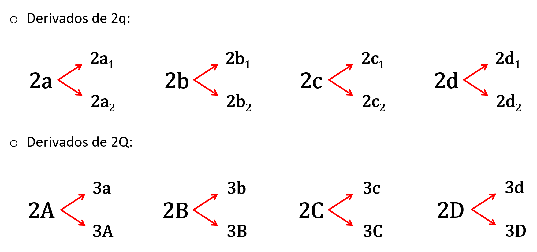 Derivados de 2q y 2Q